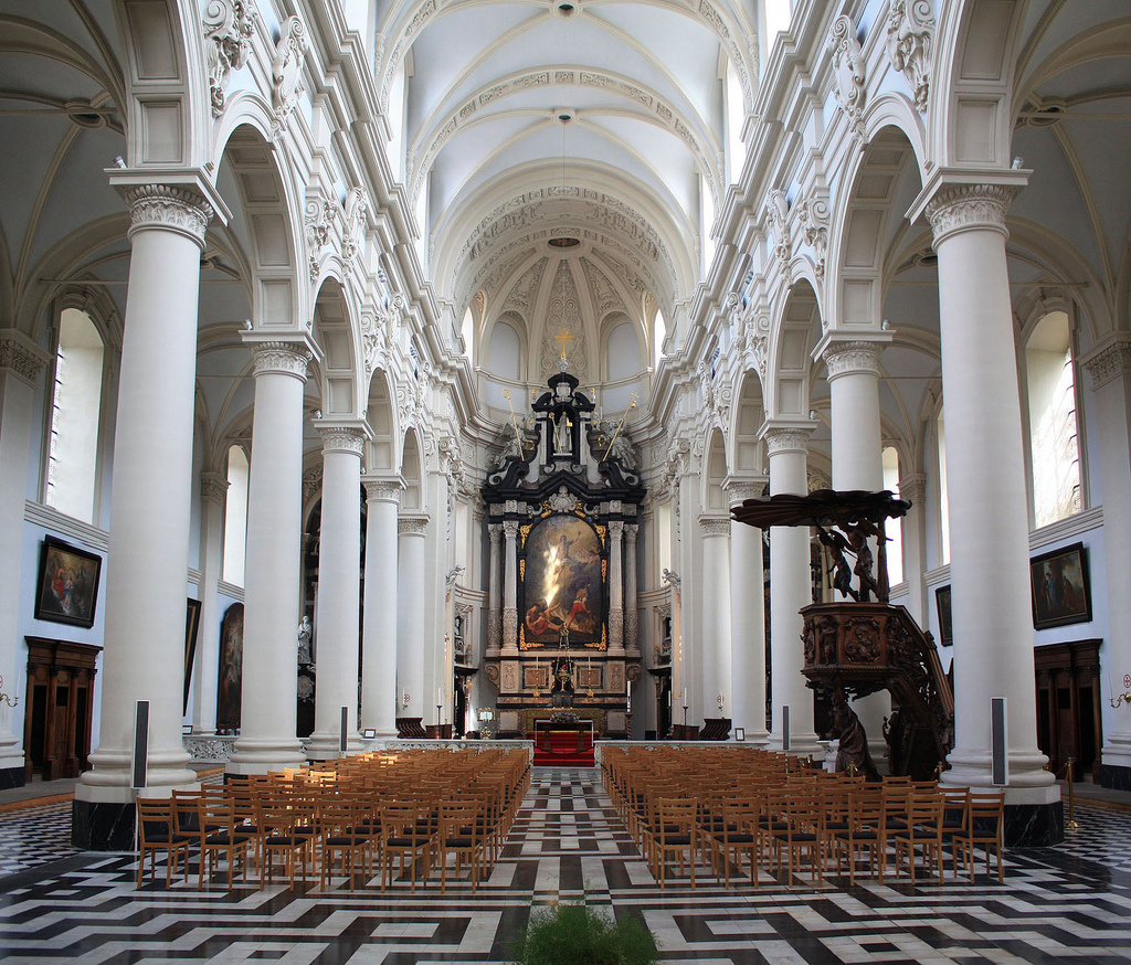 Sint Walburgakerk te Brugge